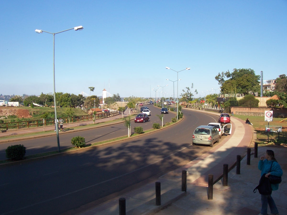 La avenida costanera de la ciudad de Posadas, a la derecha se puede observar el Río Paraná